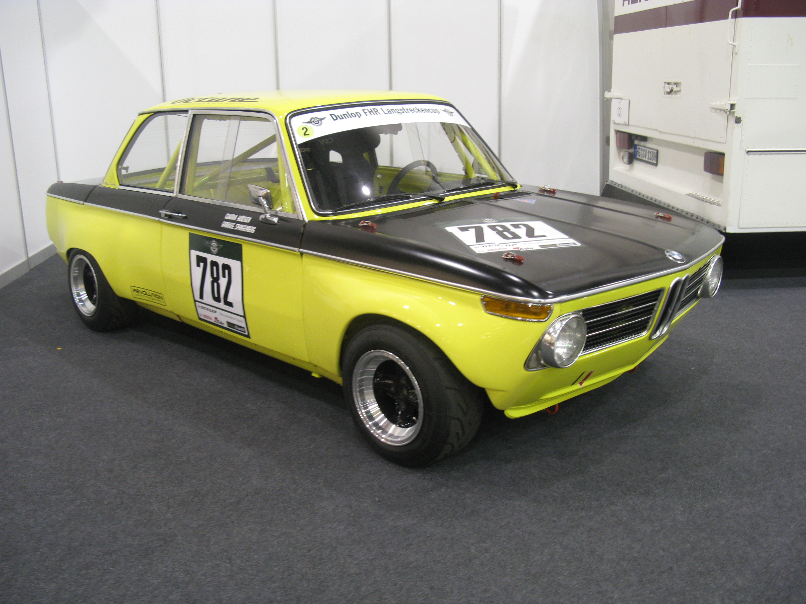 BMW 2002 Ti Langstrecken Cup